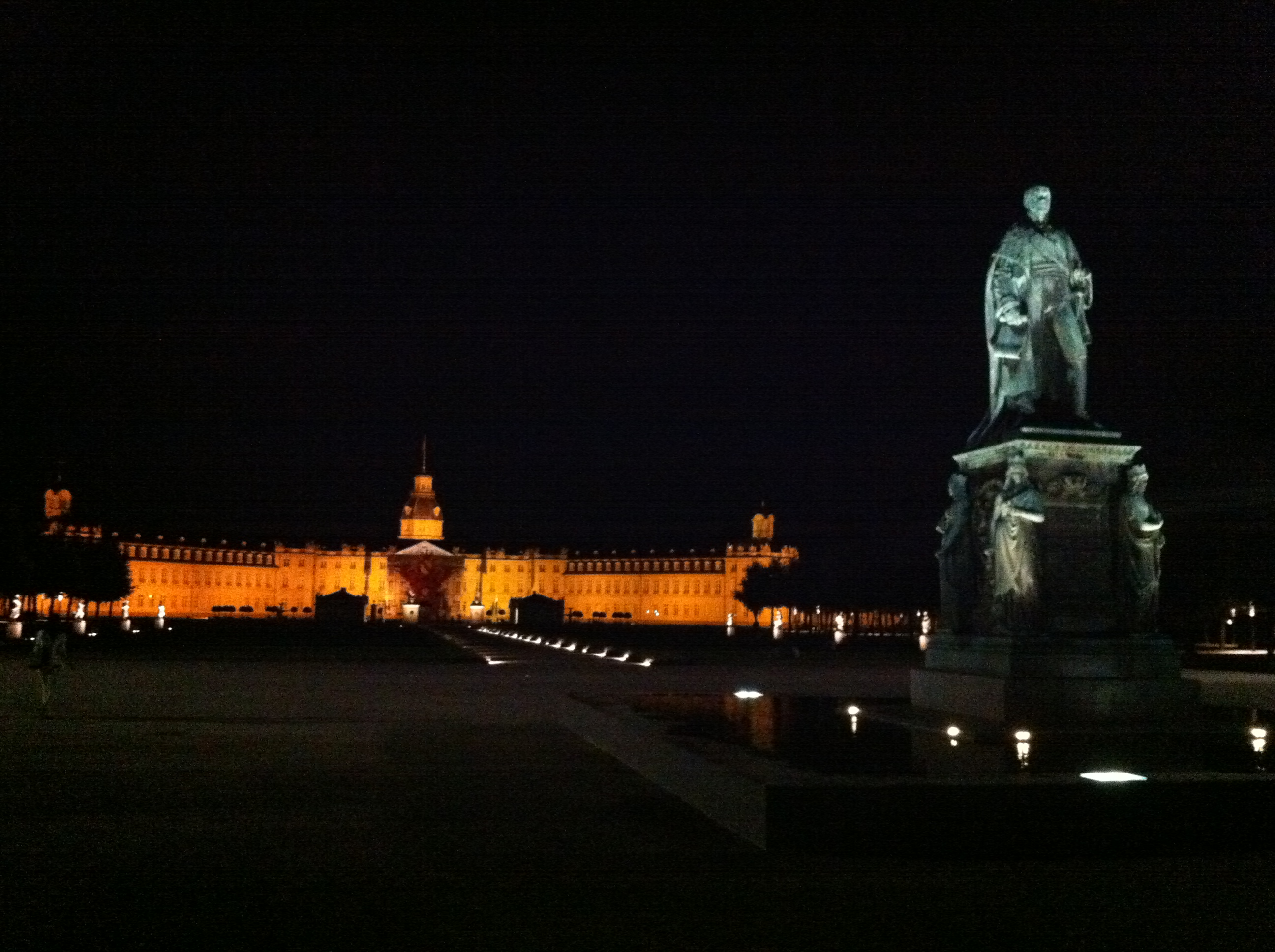 Schloss by night